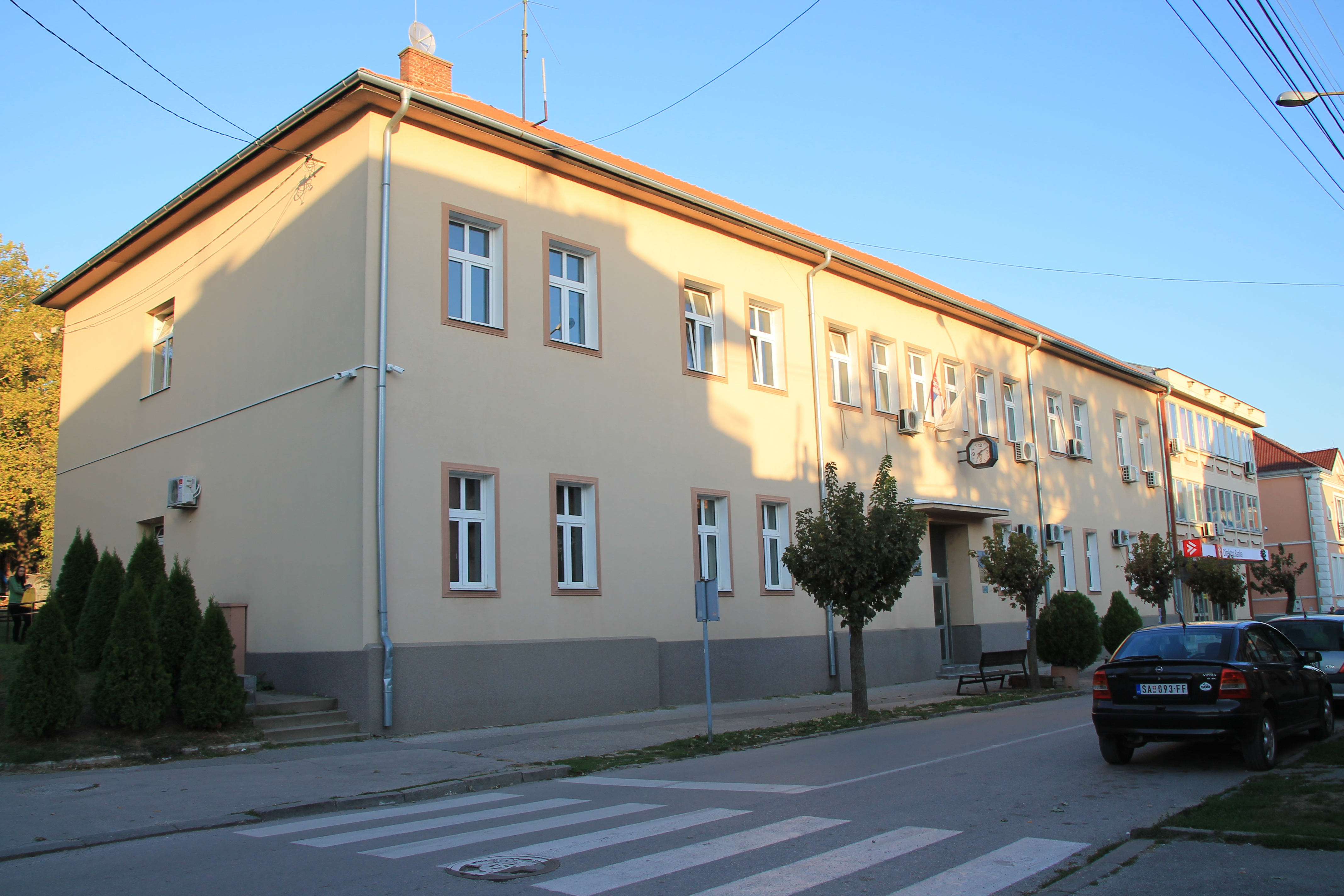 Rača, Serbia